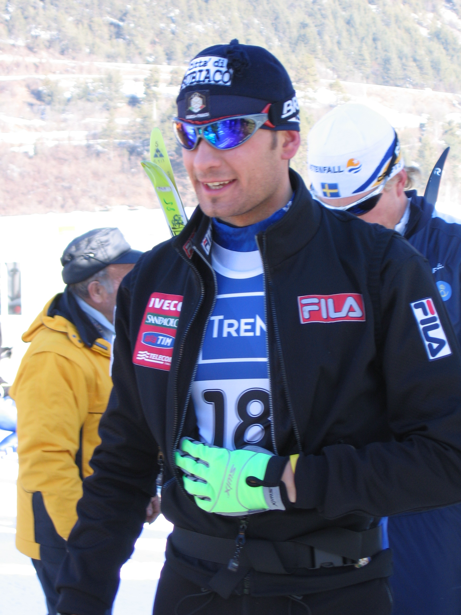 Italian skier Valerio Checchi.